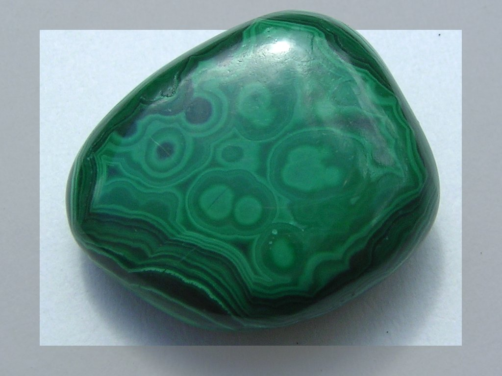 Malachit mit "Tupfer"